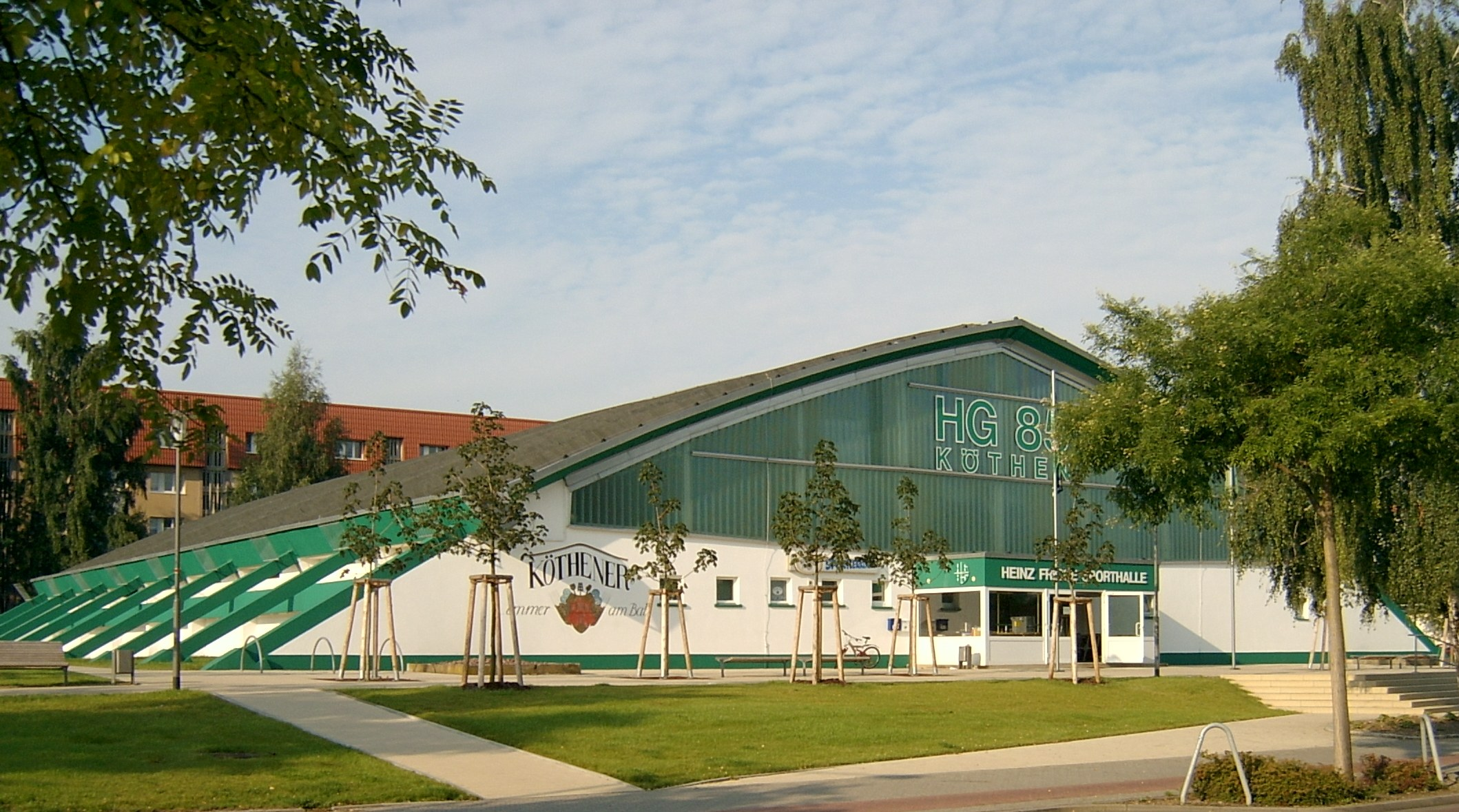 Die Heinz Fricke Sporthalle in Köthen (Anhalt) in der Rüsternbreite.